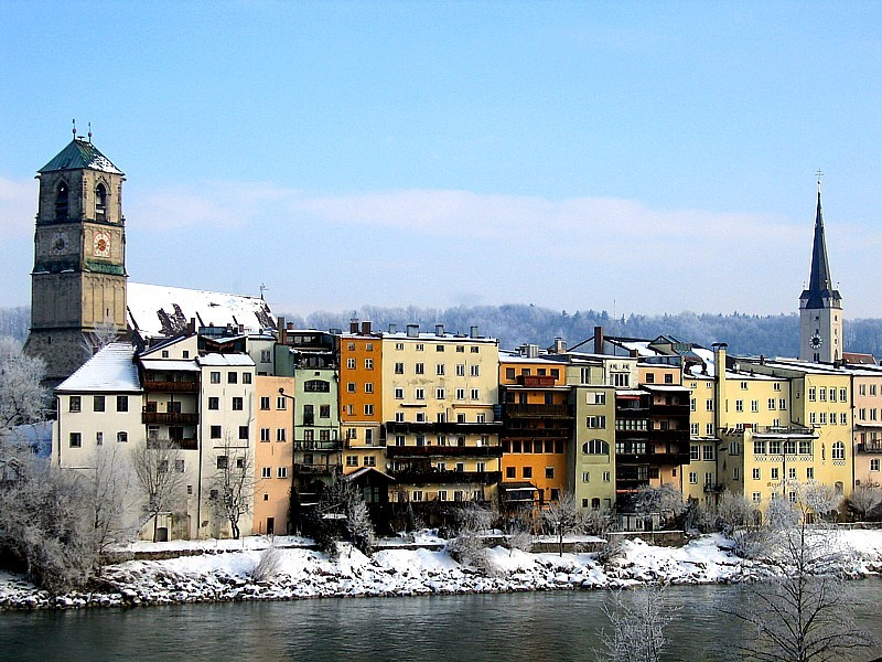 Wasserburg am Inn - Bayern - Deutschland